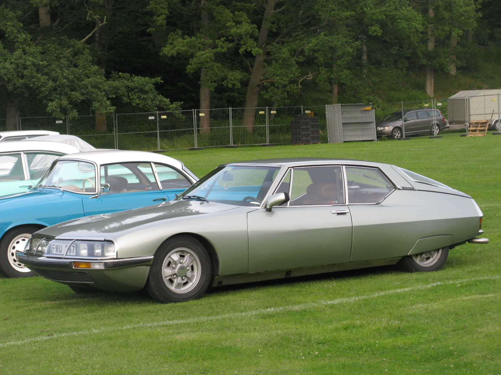 Citroen SM